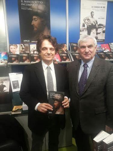 Totti